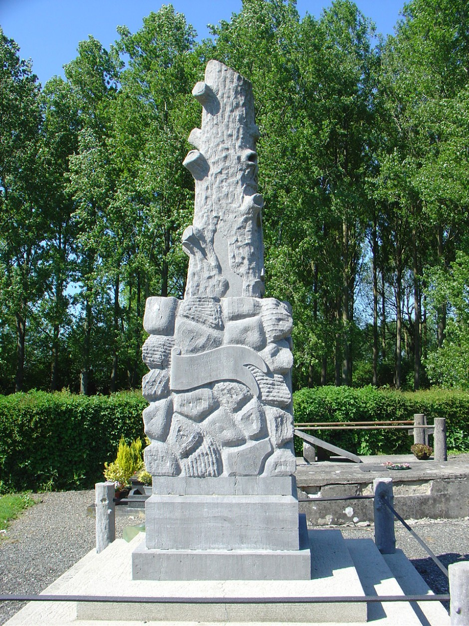 Monument aux morts d'Herlin-le-Sec